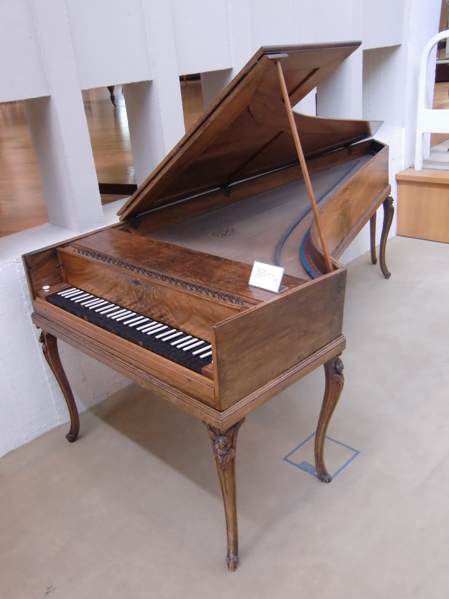 Pianoforte de Jean-Henri Silbermann (Strasbourg, 1776) - Berlin, Musikinstrumentenmuseum